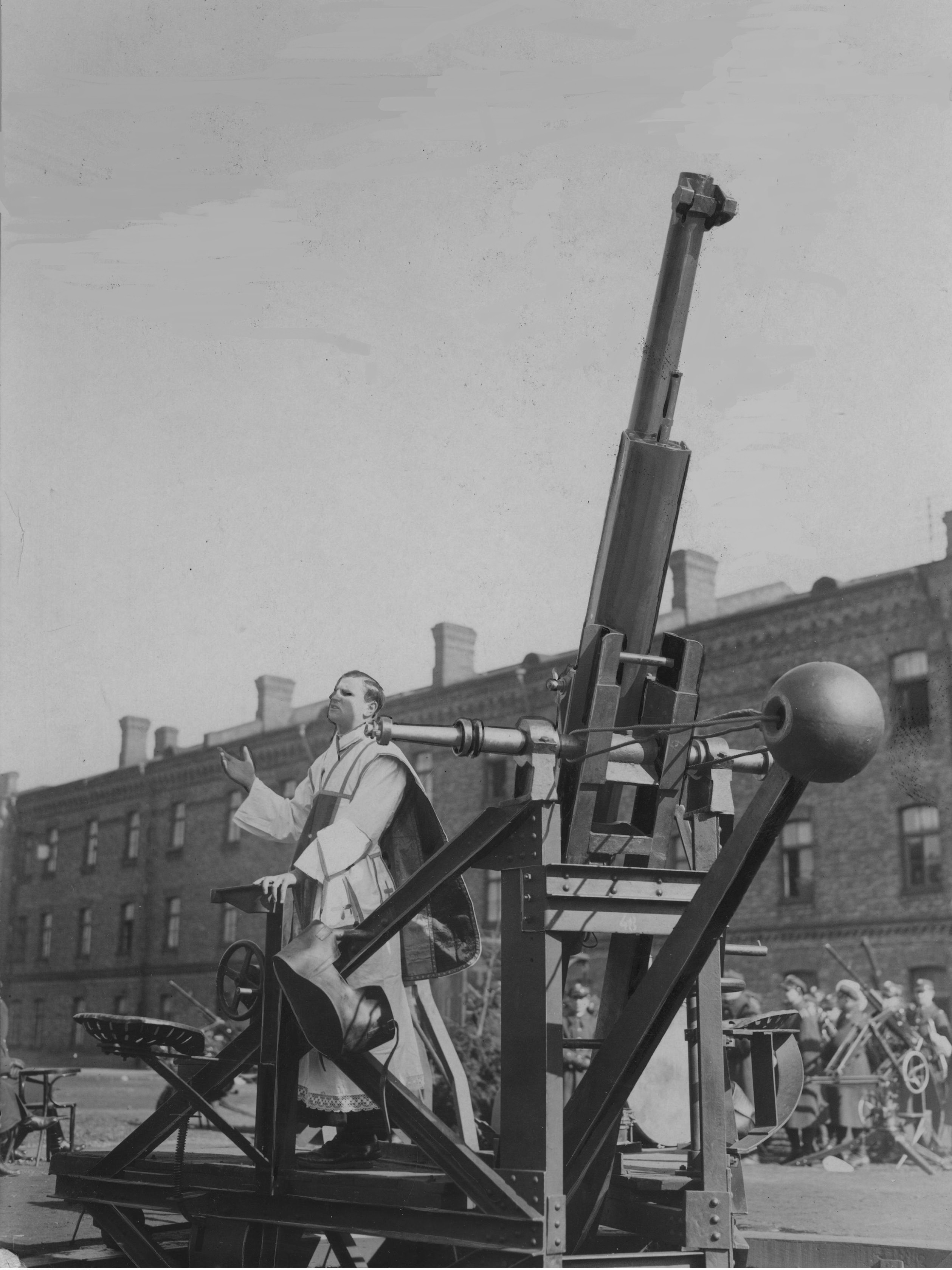 Święto 1 Pułku Artylerii Przeciwlotniczej im. marszałka Edwarda Rydza-Śmigłego w Warszawie. Kazanie księdza Jana Morawińskiego podczas mszy na lotnisku w Warszawie. Widoczna armata francuska 75 mm wz.97/25. Koncern Ilustrowany Kurier Codzienny - Archiwum Ilustracji. Sygnatura: 1-W-1535